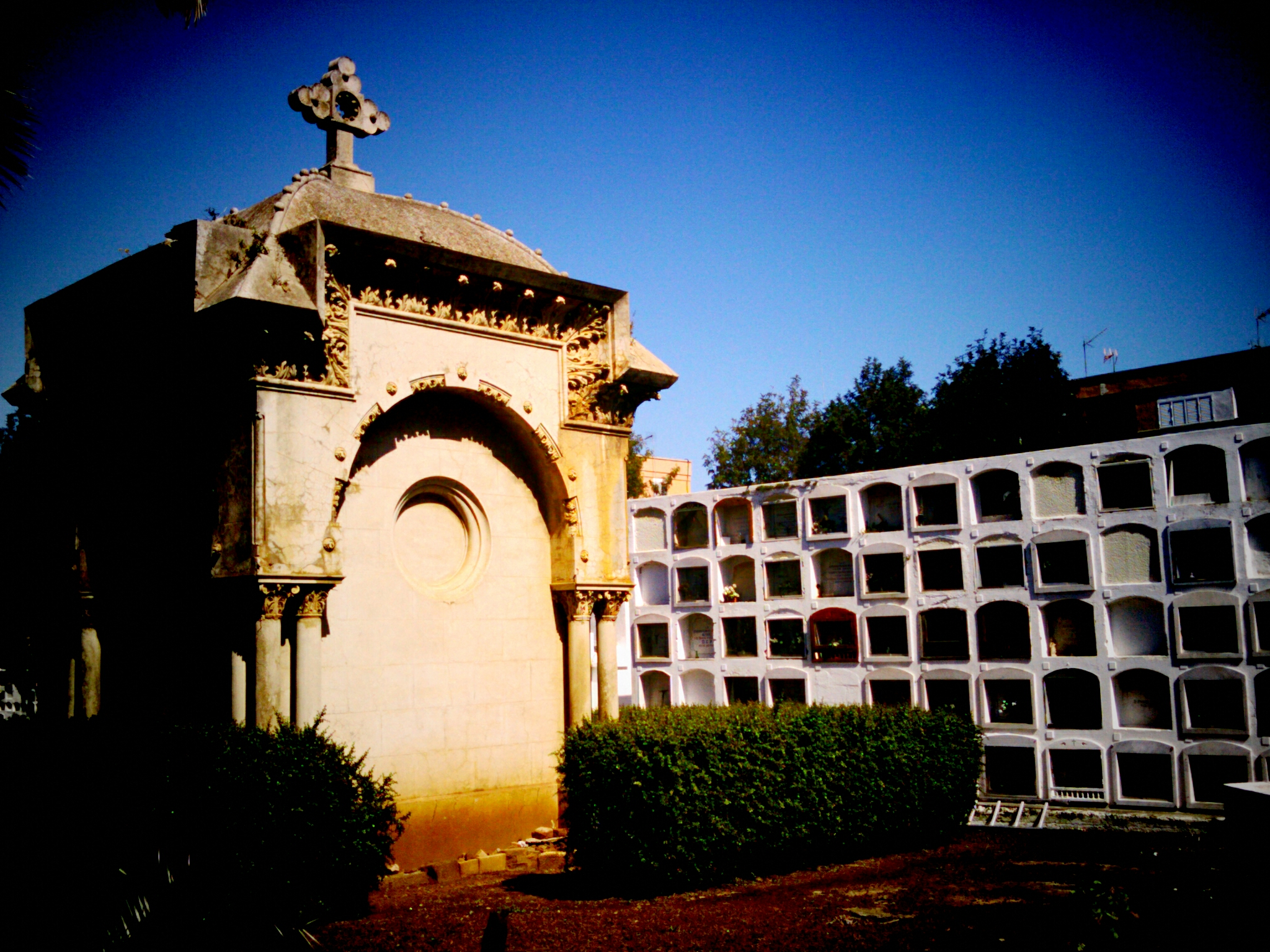 Cementerio de San Juan (La Laguna)